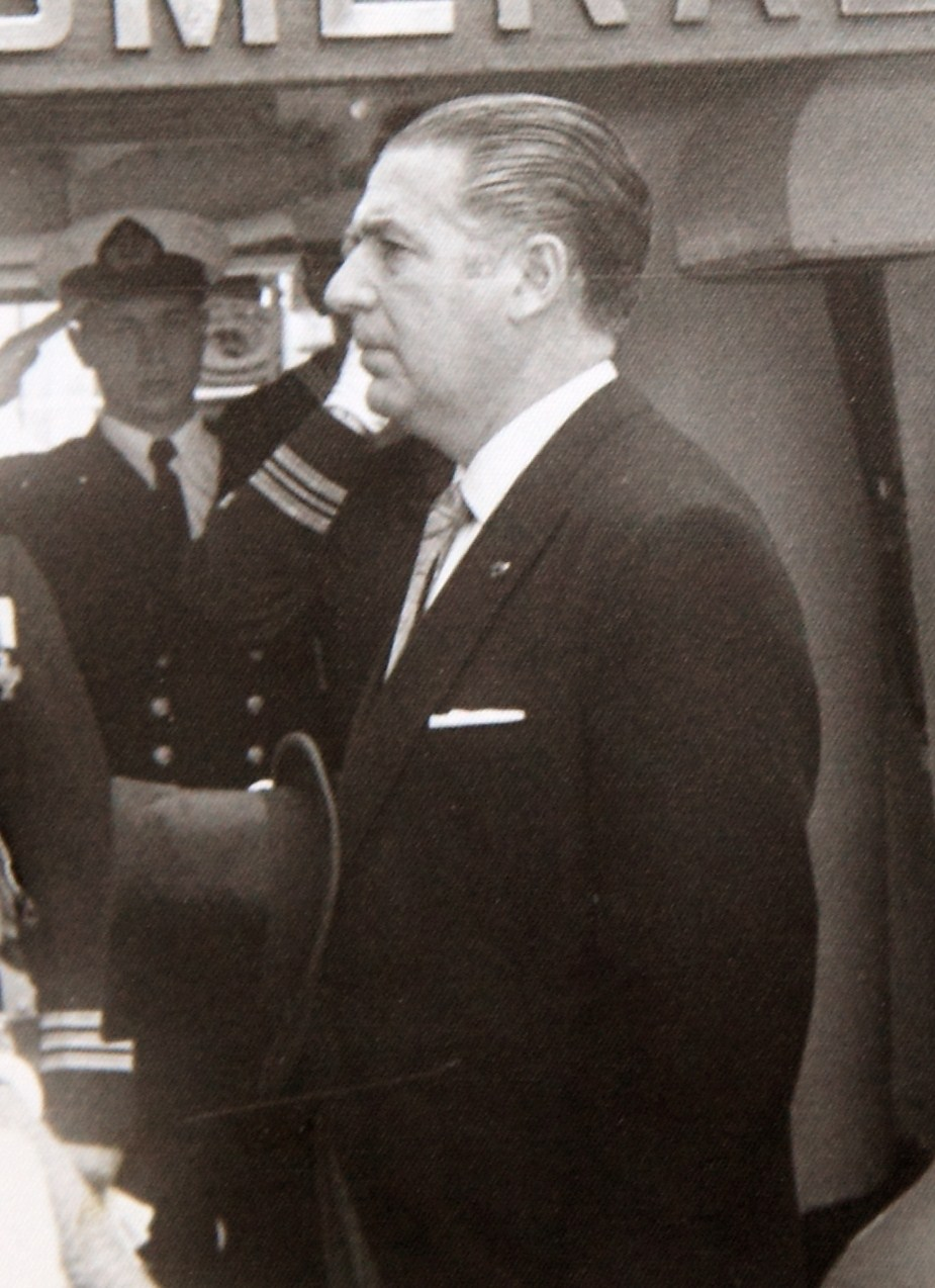 Fernando Belaúnde Terry, Presidente del Perú.